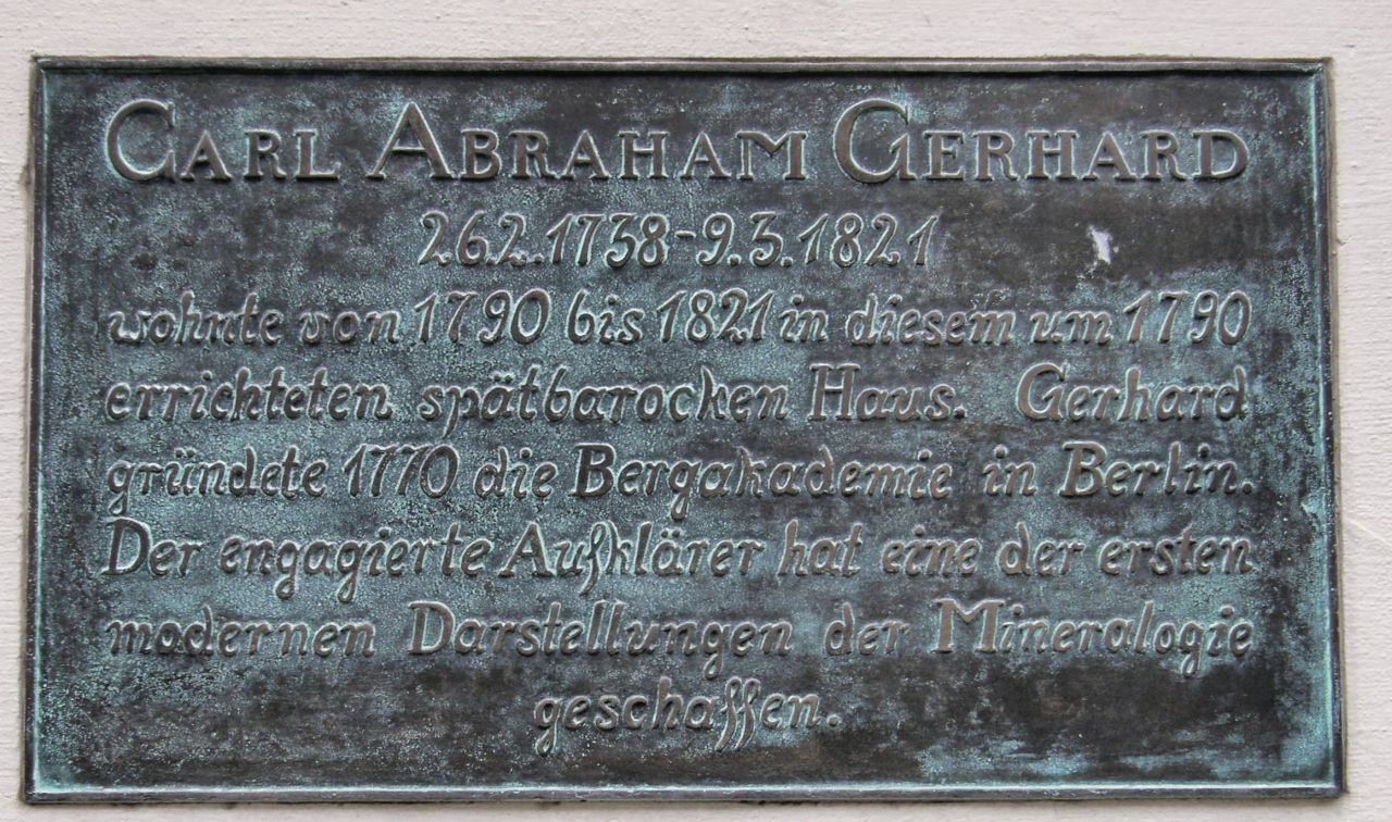 Gedenktafel für Carl Abraham Gerhard. Neue Grünstraße 27, Berlin-Mitte. Enthüllt am 2. Juni 1998.